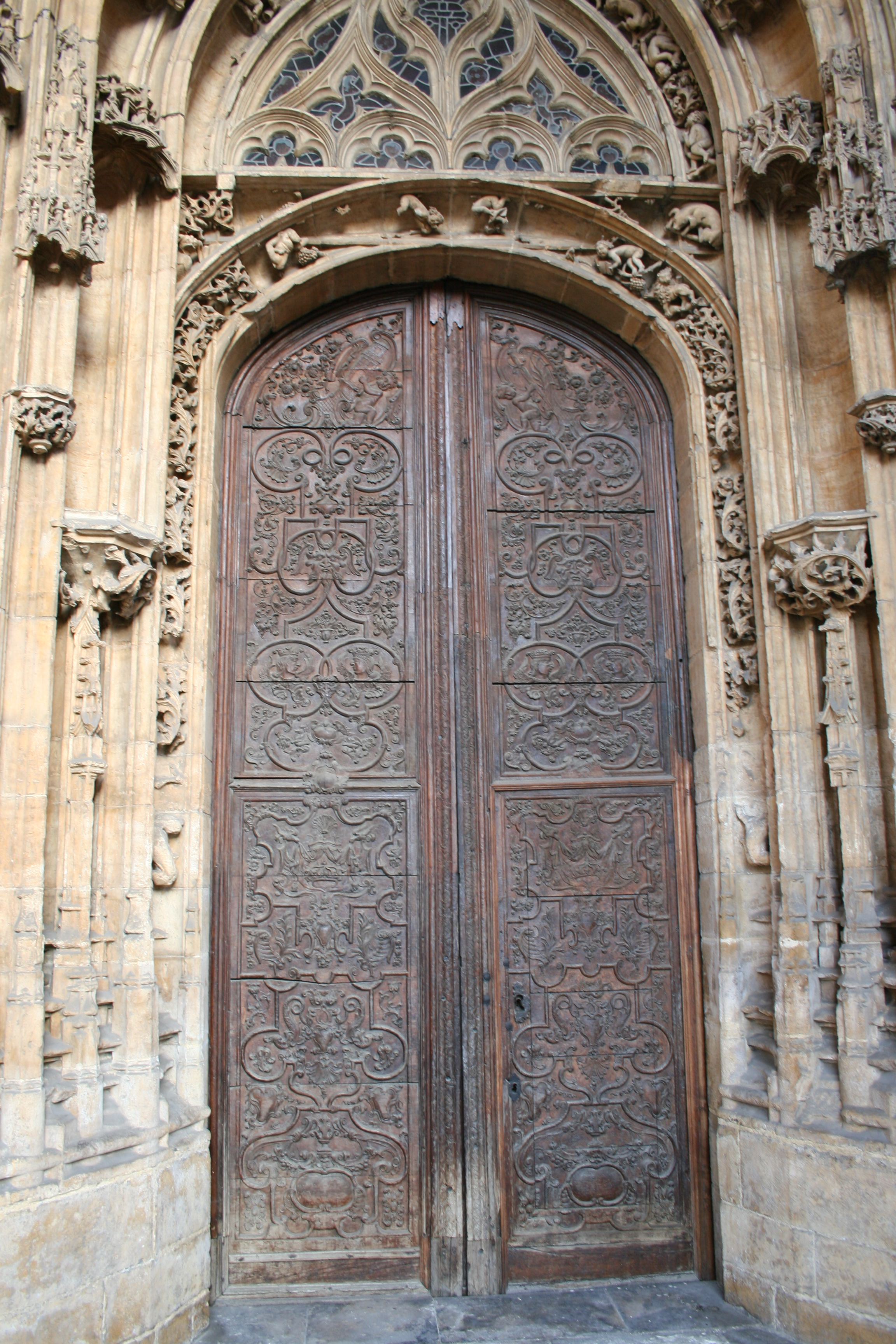 Puerta principal de la catedral de Oviedo